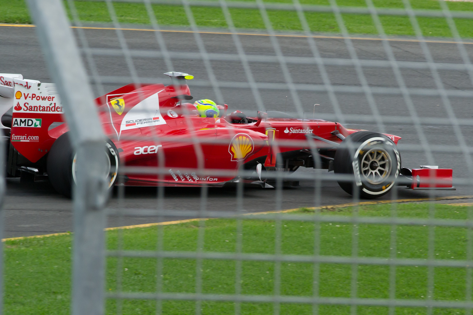 2012 Australian Grand Prix — Felipe Massa